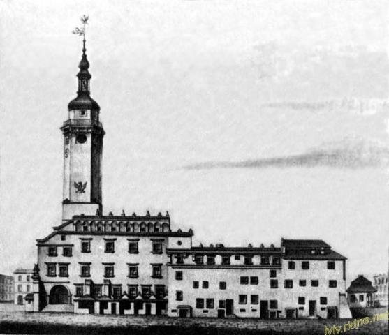 Давня львівська ратуша. Рис. Ю. Глоговського з початку XIX ст.